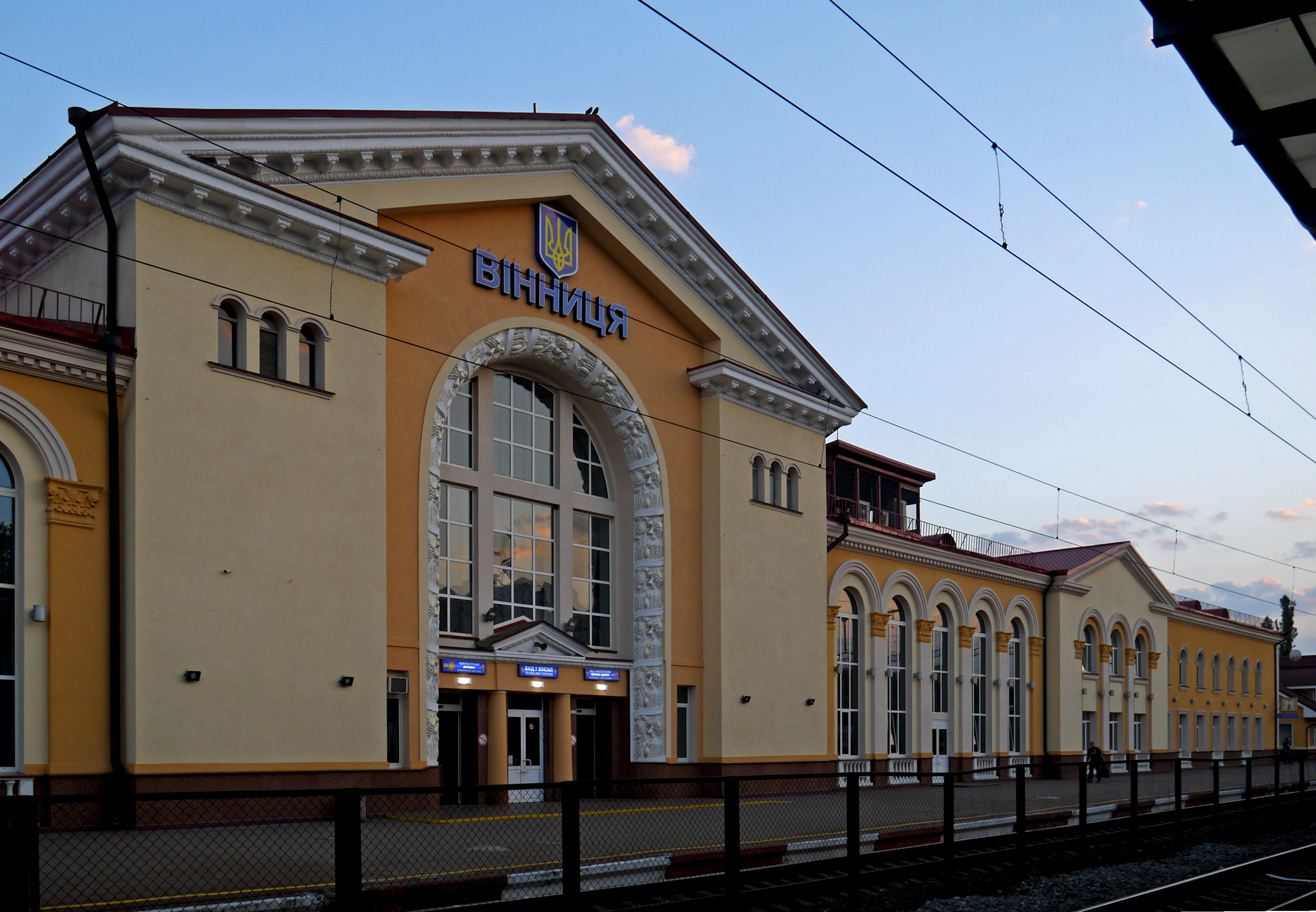 Залізничний вокзал, Вінниця, площа Привокзальна (Героїв Сталінграда), 1